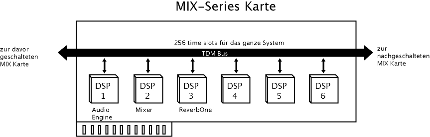 TDM I Bustruktur